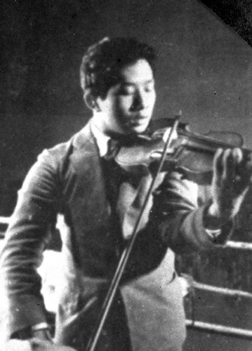 聂耳演奏小提琴的资料照片。新华社发